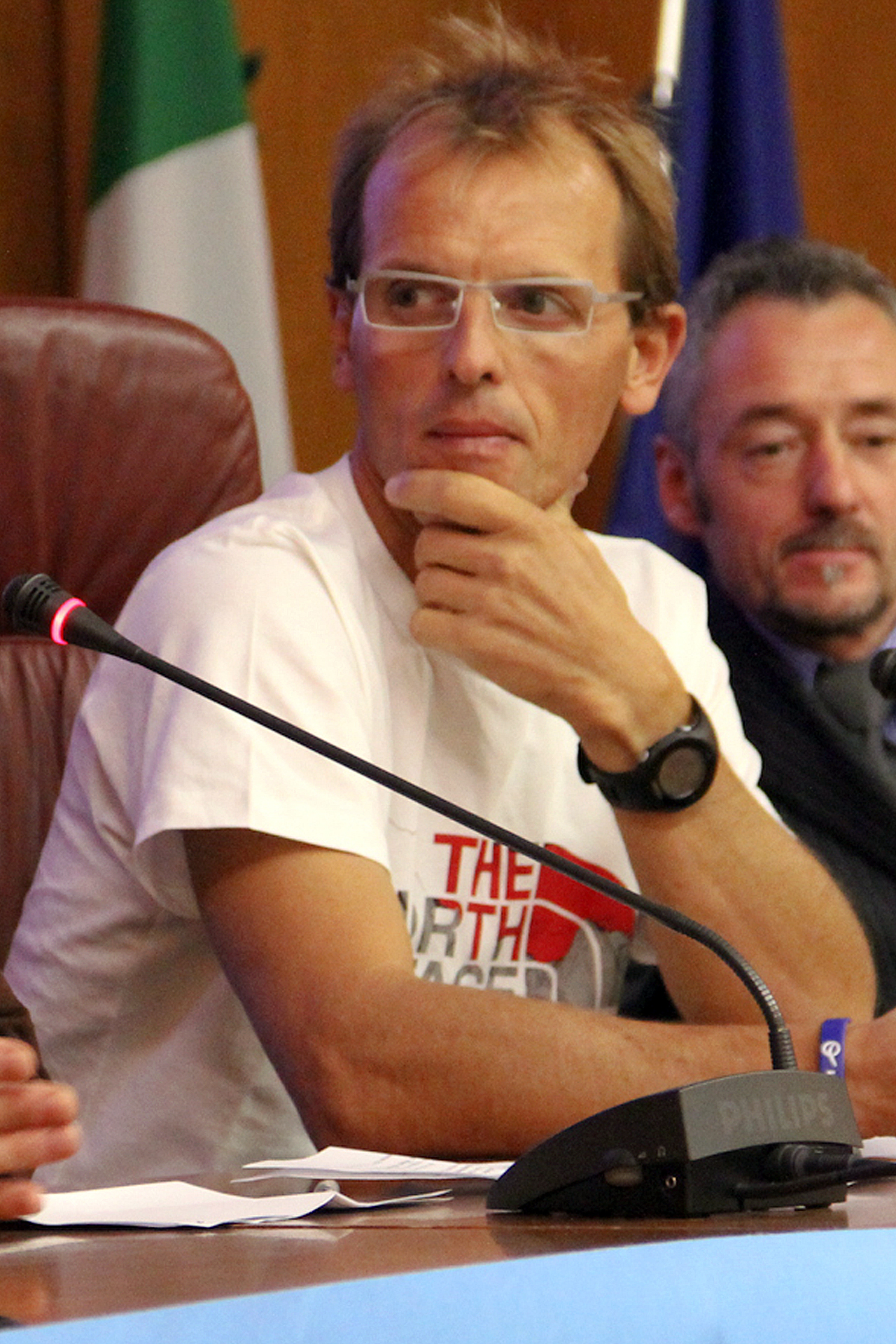 Simone Moro nel 2011